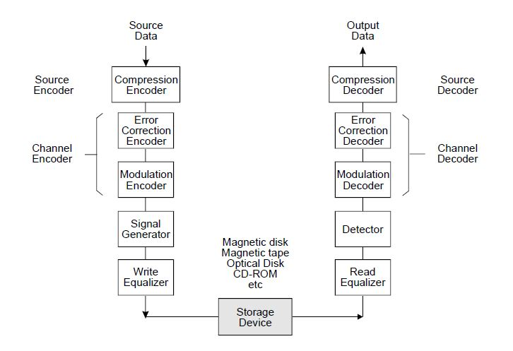 tab